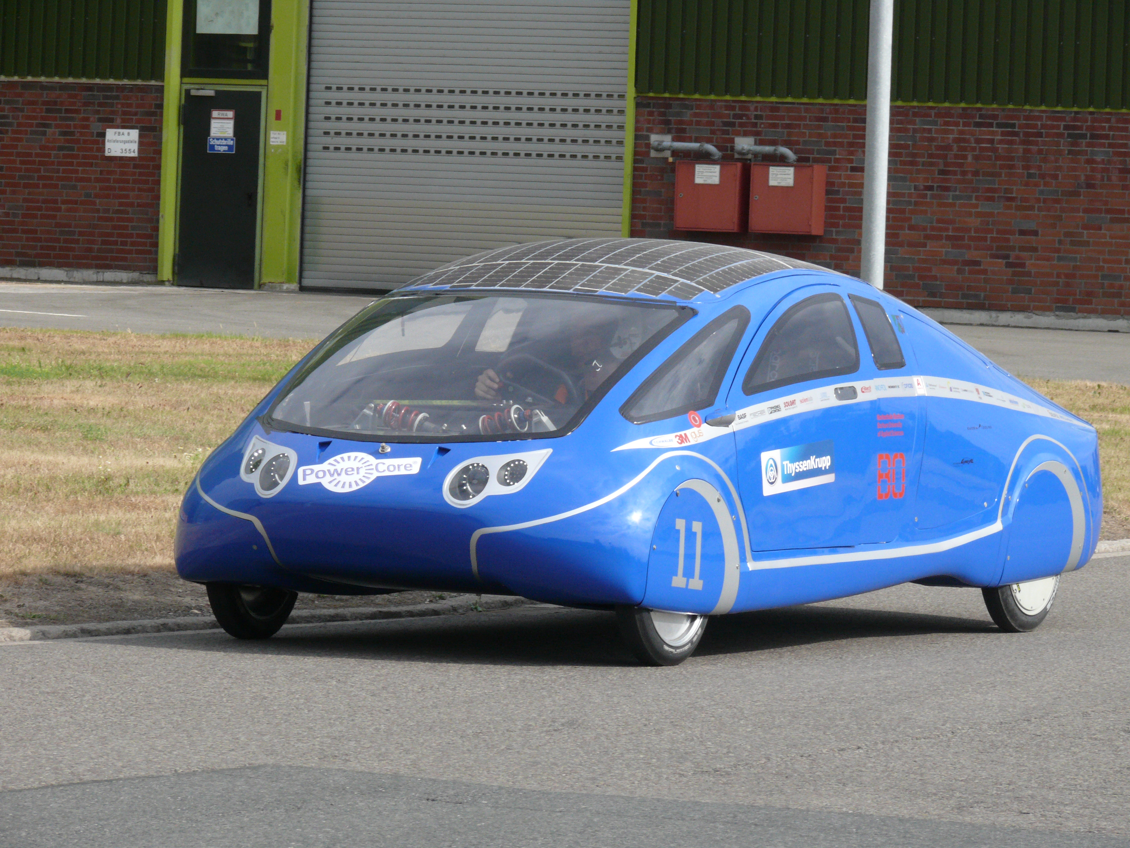 PowerCore SunCruiser, Solarcar der Hochschule Bochum, 2012/13